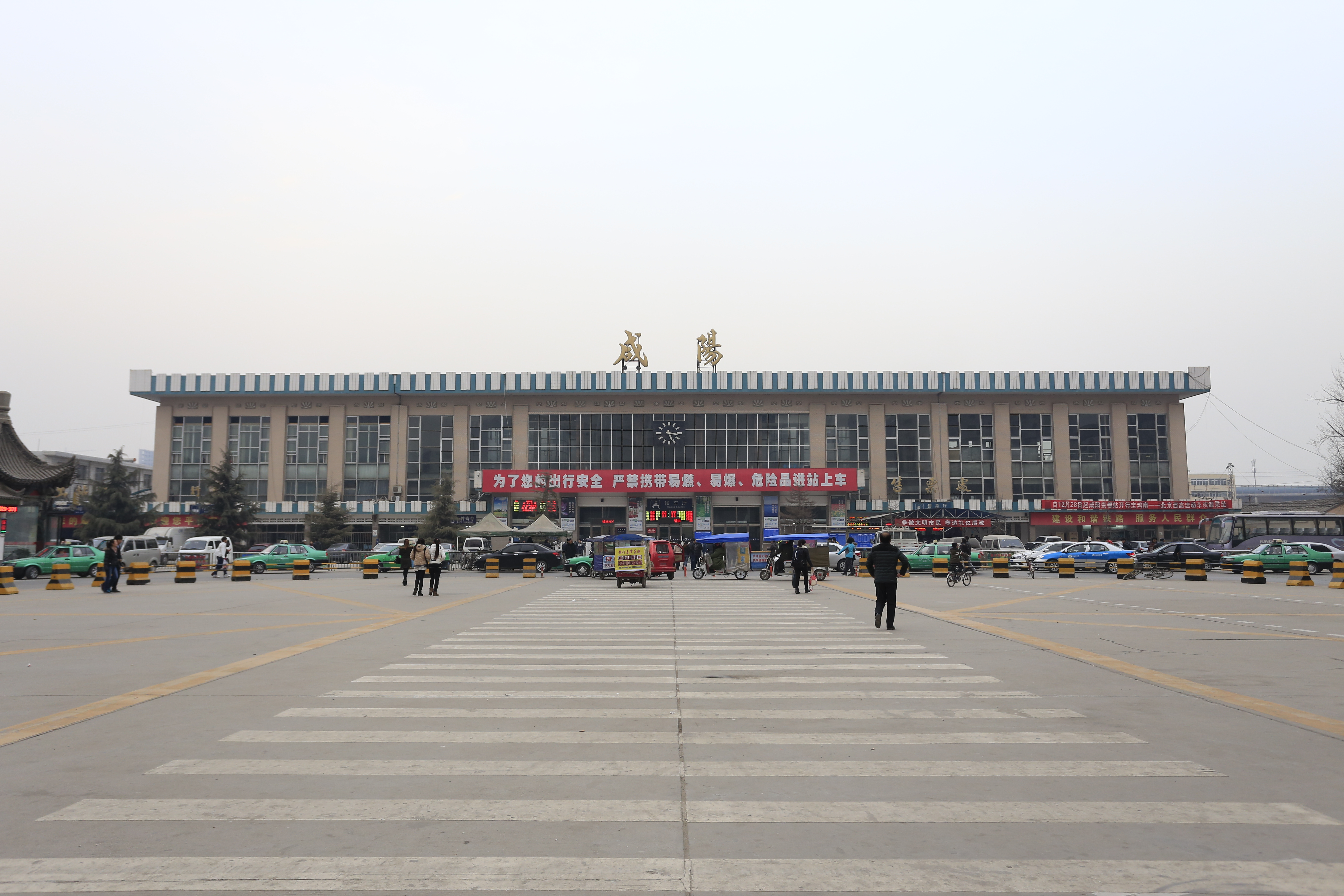 咸阳火车站